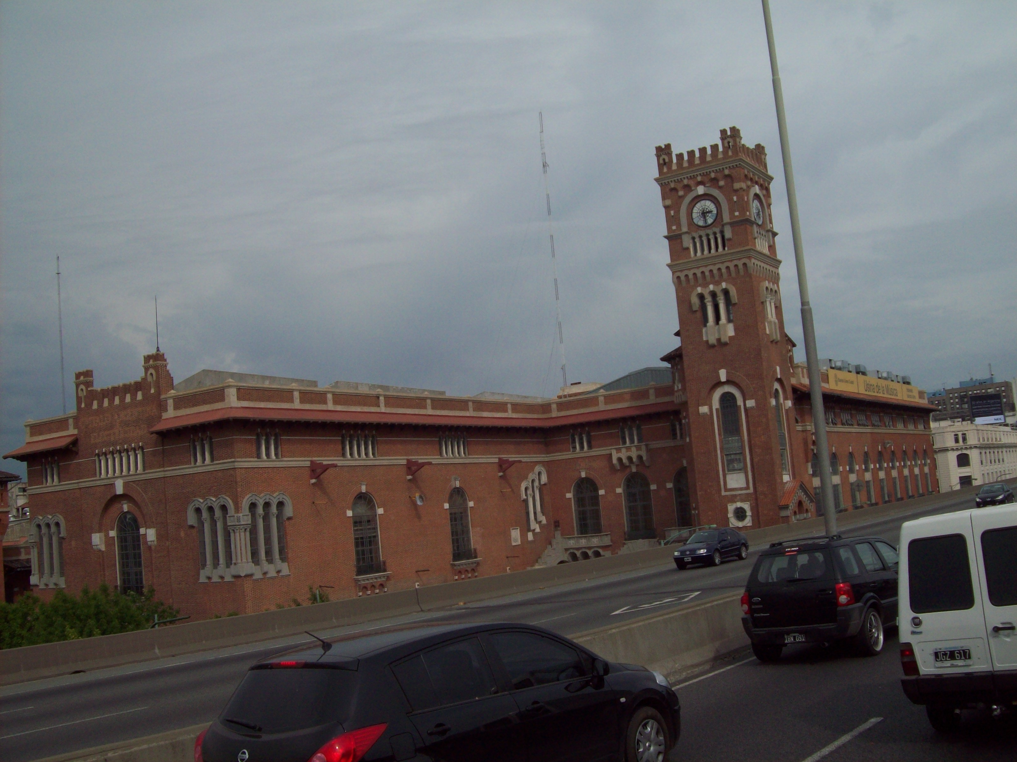 Usina de la Música en La Boca, ciudad de Buenos Aires. Vista desde la Autopista Buenos Aires - La Plata.